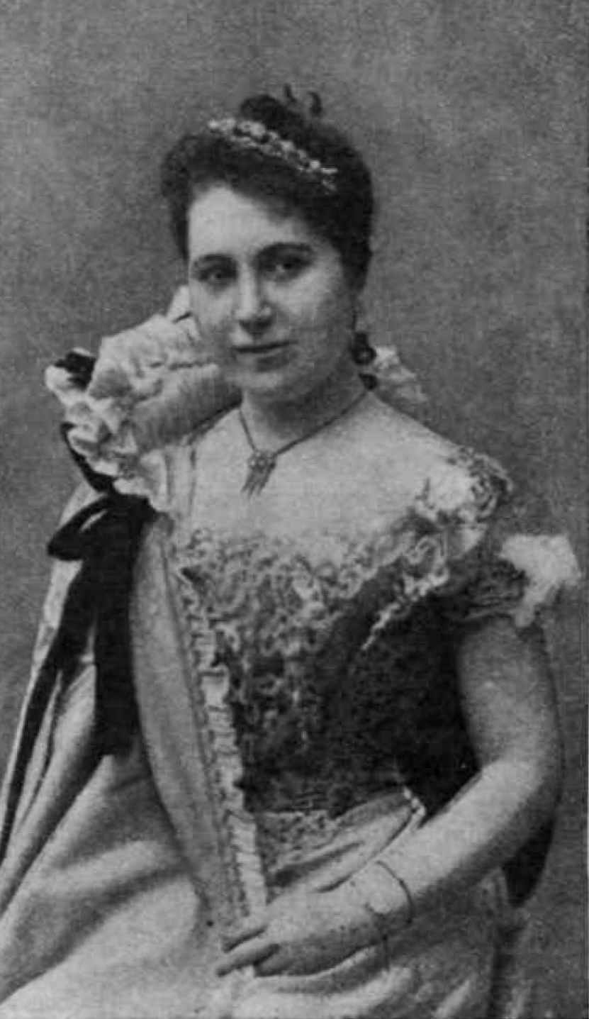 Perényi Marjorie, Lukács György miniszter neje